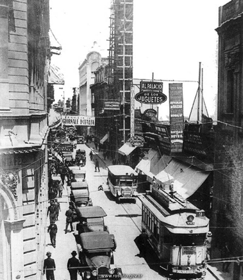 Horario pico de comercio en una de las zonas más activas del centro de la ciudad. Hacia el fondo se puede apreciar la esquina de Córdoba y San martín, con el frente del edificio de Gath & Chavez, actualmente el paseo Victoria Mall. La identificación de esta imagen fue realizada por el Sr. Facundo Fernández